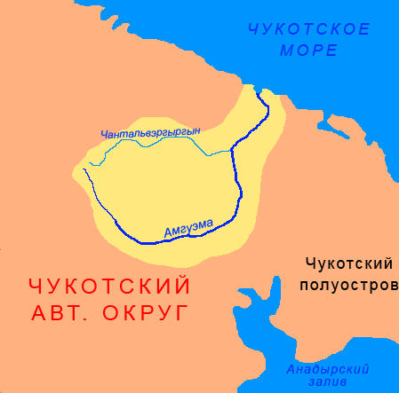 Схема бассейна реки Амгуэма